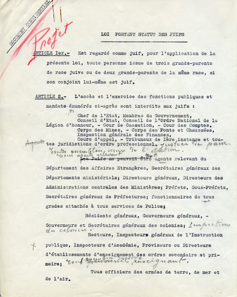 Page annotée de la main de Pétain du Statut des Juifs - page 1